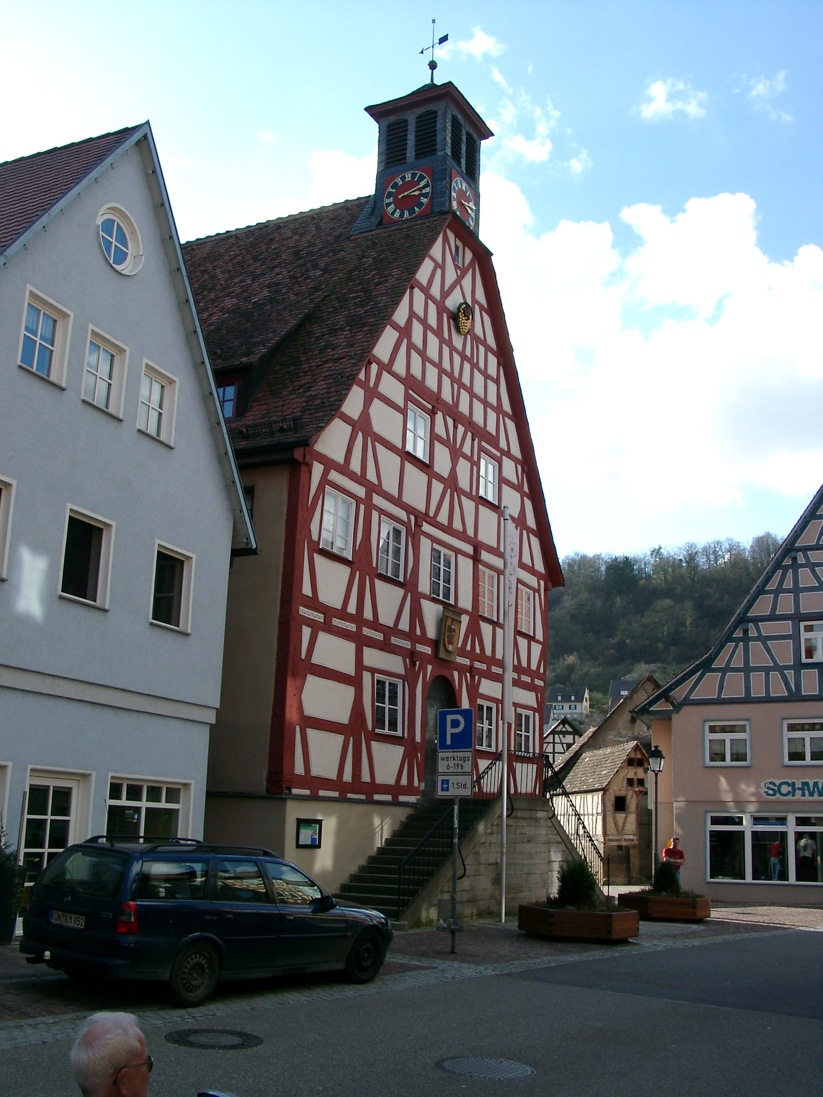 Niedernhall, Rathaus